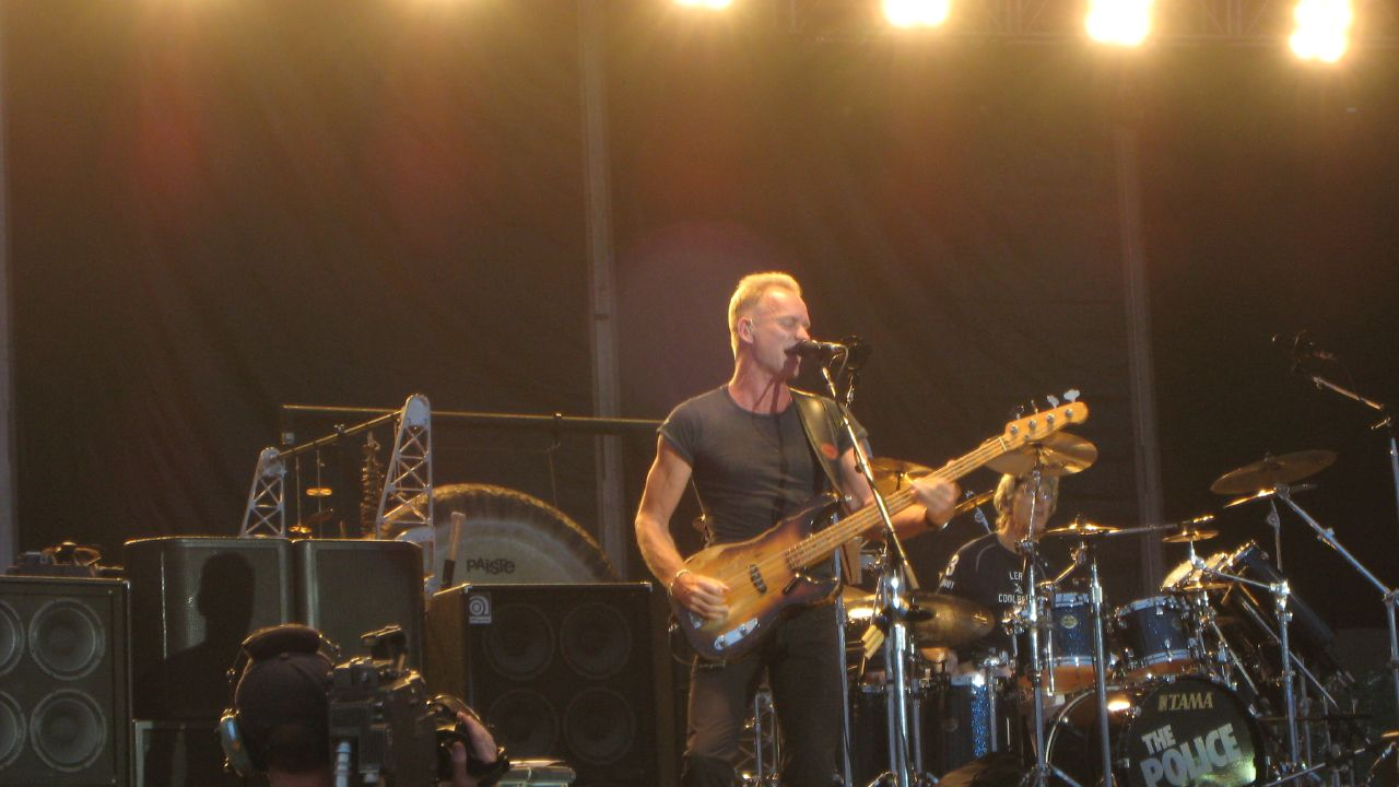 Sting